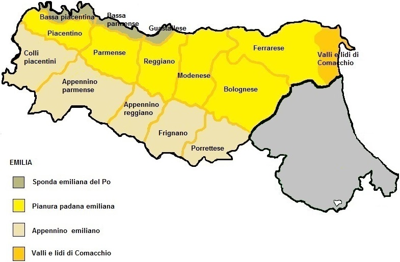 Emilia - territori